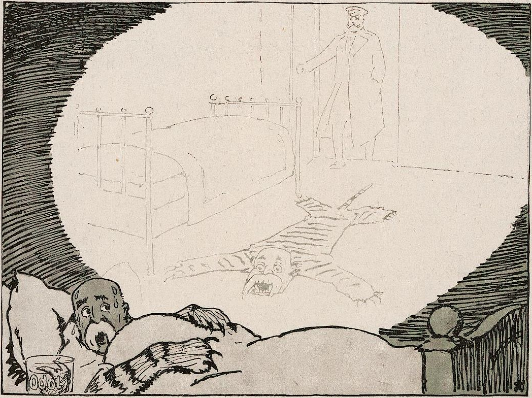 „Zukunftsahnungen: Der Tiger Clemenceau: 'Entsetzlicher Traum: ich sah mich als Bettvorleger bei Hindenburg...'“ (Karikatur in: Jugend. Münchner illustrierte Wochenschrift für Kunst und Leben, Heft 1/1918 S. 19)